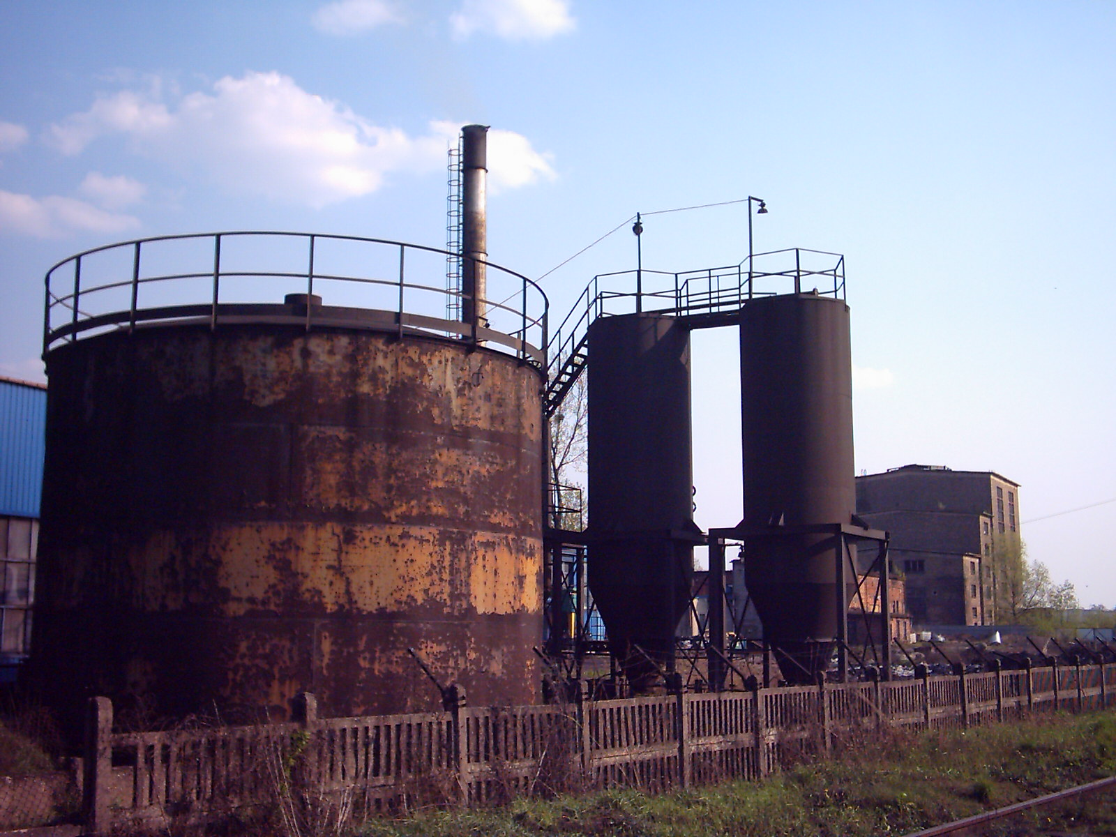 Gryfskand Hajnówka